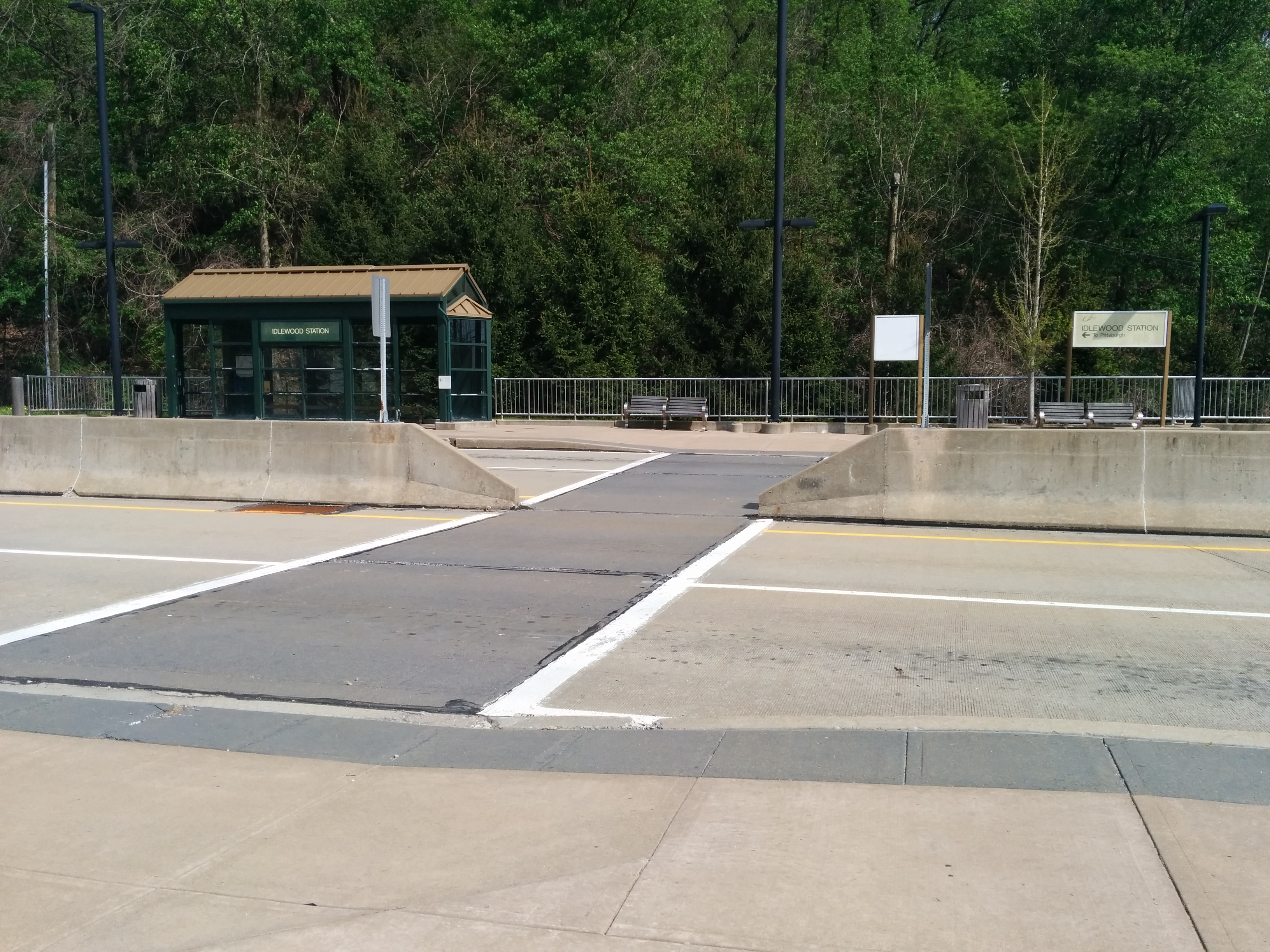 IMG_20150504_154527